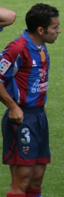 El jugador granota David Castedo Escudero